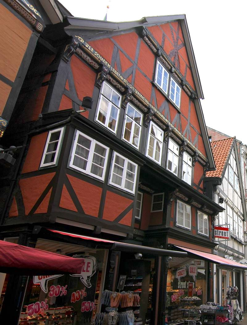 Tuchmacherhaus in der Uelzener Fußgängerzone